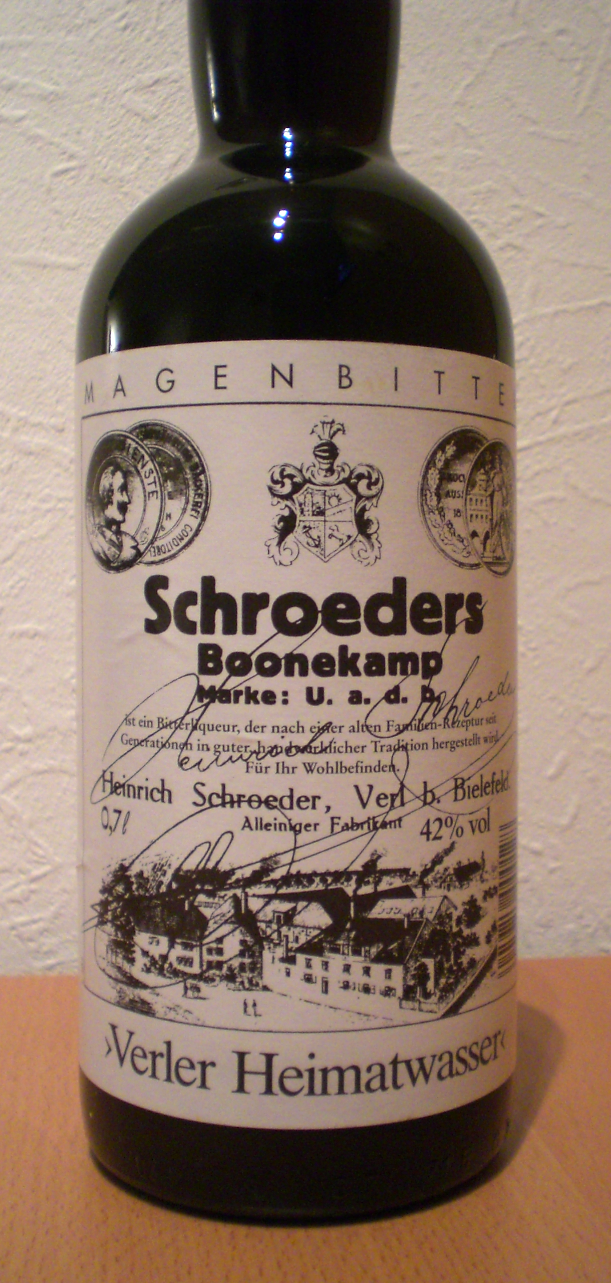 Das Etikett einer 0,7 Liter Flasche Schroeders Boonekamp, auch vertrieben als Verler Heimatwasser.